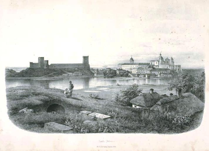 Помпей Батюшков. Замок Любарта, ХІХ ст.